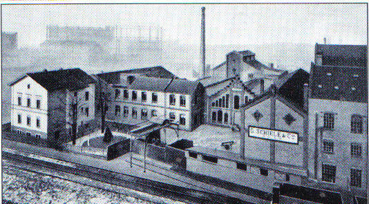 Frankfurt Bockenheim Solmsstraße ehemalige G. Schiele & Co., erste deutsche Ventilatorenfabrik von 1875-1908/25, nachmalig Eschborn